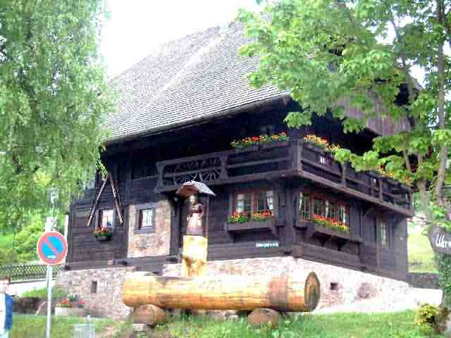 Uhrmacherhäusle in Vöhrenbach, das wohl älteste Haus der Stadt